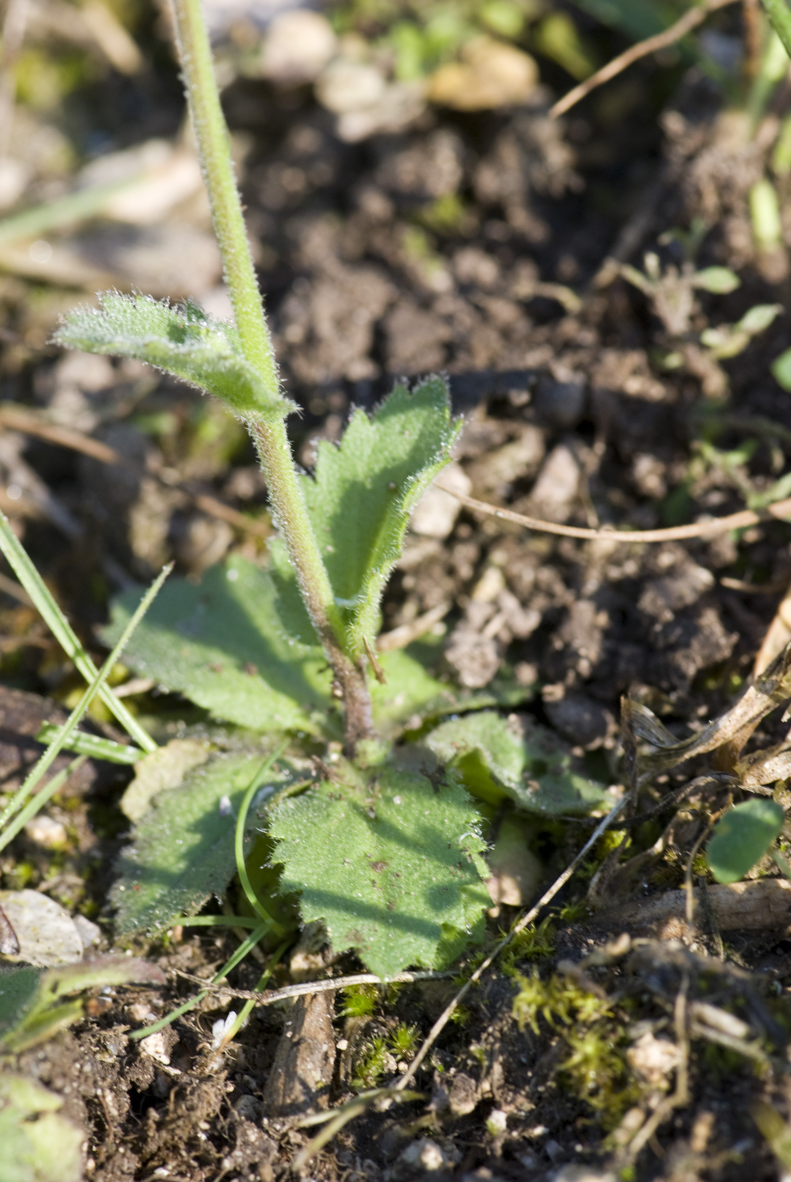 Draba muralis Route d'Ailly-sur-Meuse (Meuse), France